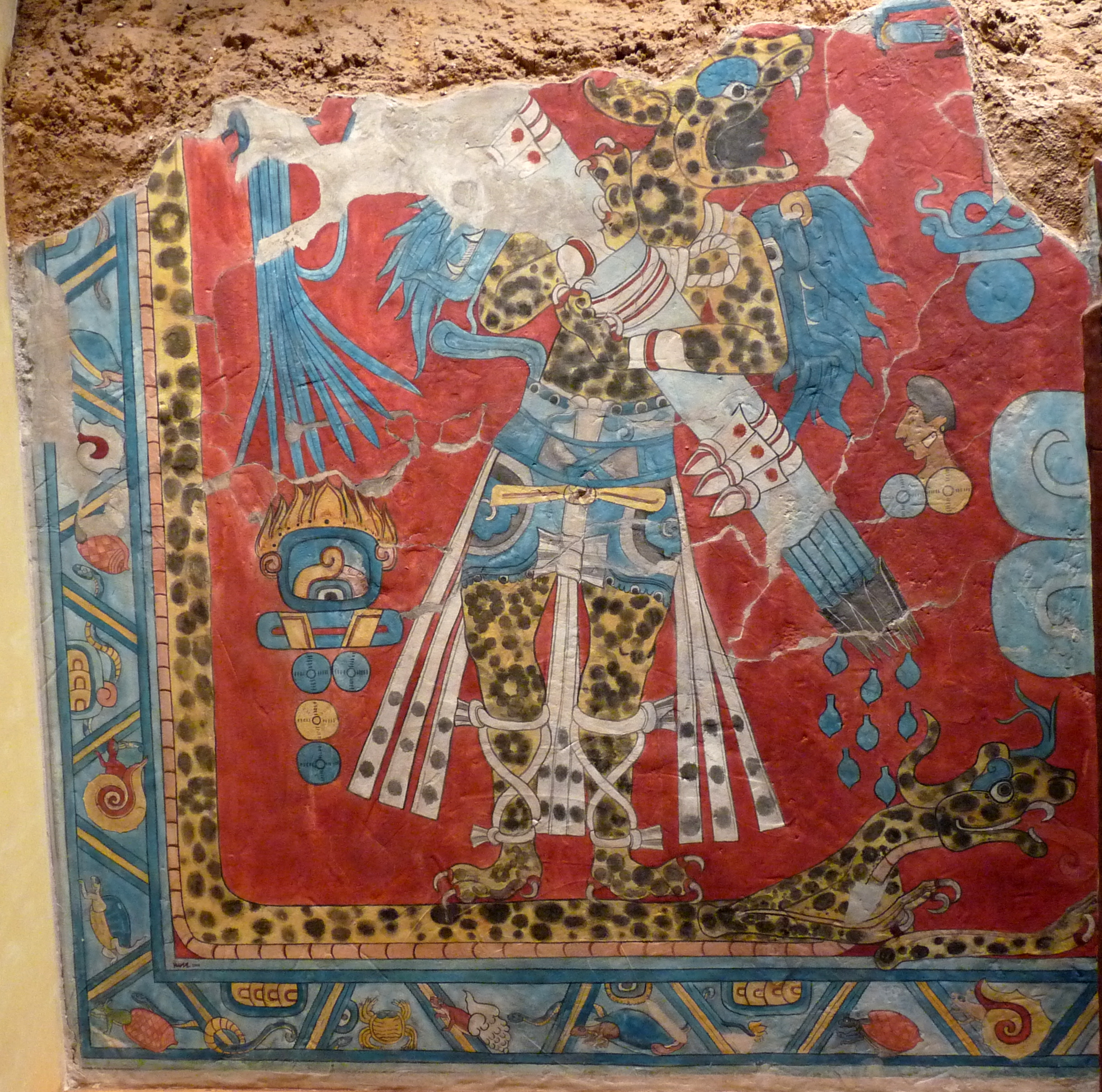 Reconstitución de una pintura mural de Cacaxtla, en el Museo Nacional de Antropología (Distrito Federal de México).